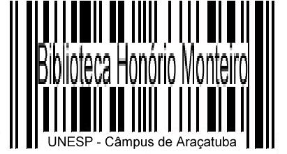 Logo da Biblioteca Honório Monteiro